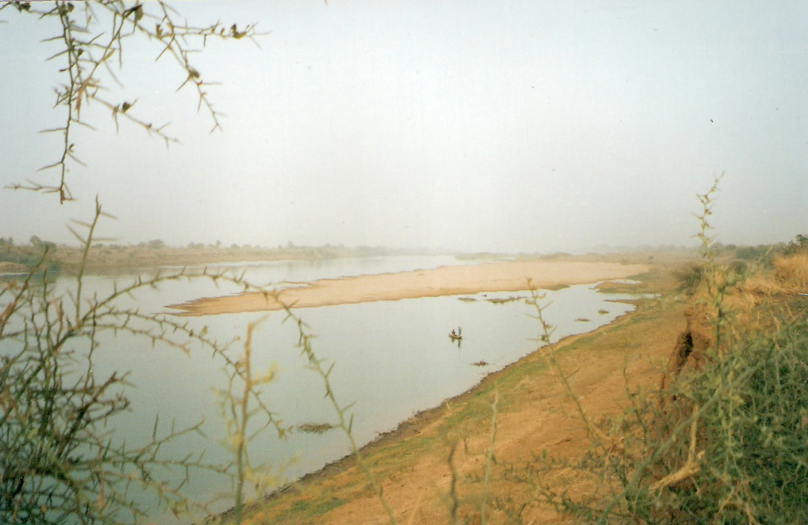 Le fleuve Sénégal, dans la région de Kayes (mali), au niveau du village soninké de Dramané.